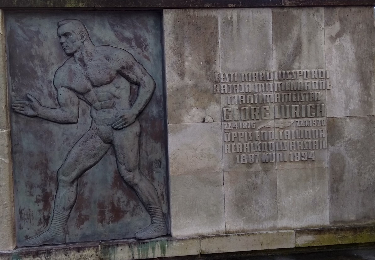 Tallinnas Reaalkooli juures asuv Georgi Lurichi bareljeef